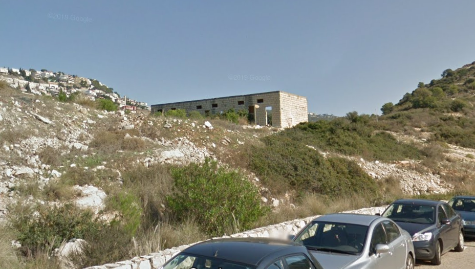 בית הספר לבנים בא-טירה היה מתחם של שני מבנים, מבנה אחד – שהיה לכיתות הנמוכות - עמד על בקצה הכפר על גבעת אלֻקף , היה מוזנח והרוס חלקית במשך שנים רבות ונהרס בשנת 2016 ובמקומו נבנה מלון קדם - טירת כרמל המבנה השני הוא היום בית ספר התיכון שיפמן